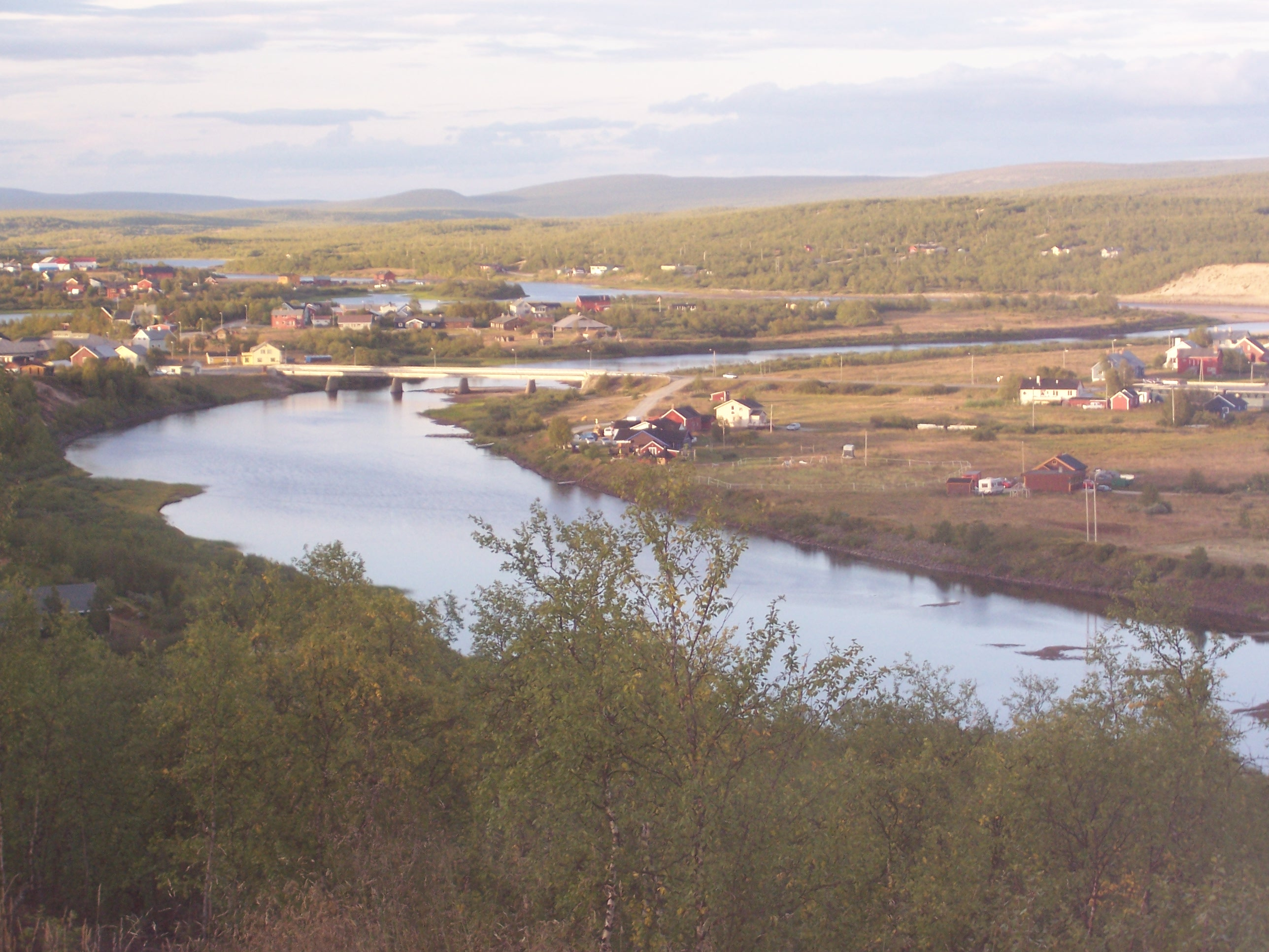 Davvisámegiella: Guovdageaineatnu 25.8.2012